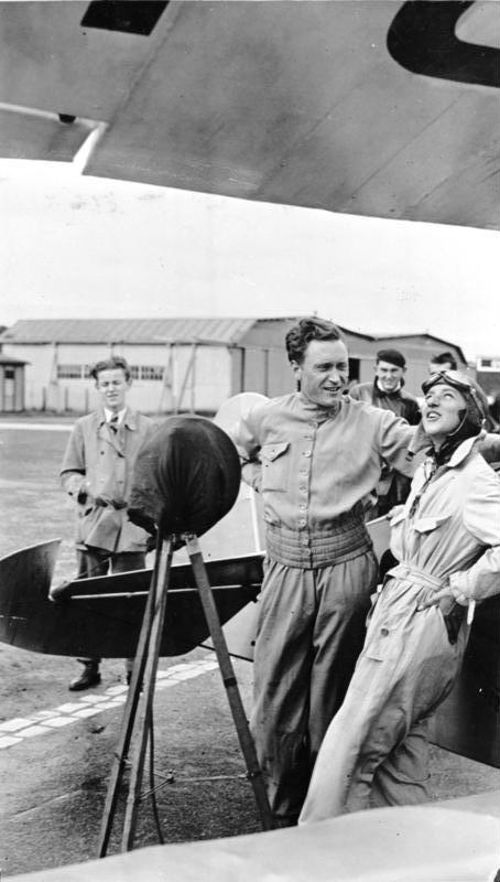 ADN-Zentralbild-Archiv Die Kunstflugmeisterschaften 1931 in Berlin-Tempelhof. UBz: Gerhard Fieseler und Vera von Bissing beobachten den Flug ihrer Kollegin Liesl Bach. 29145-31